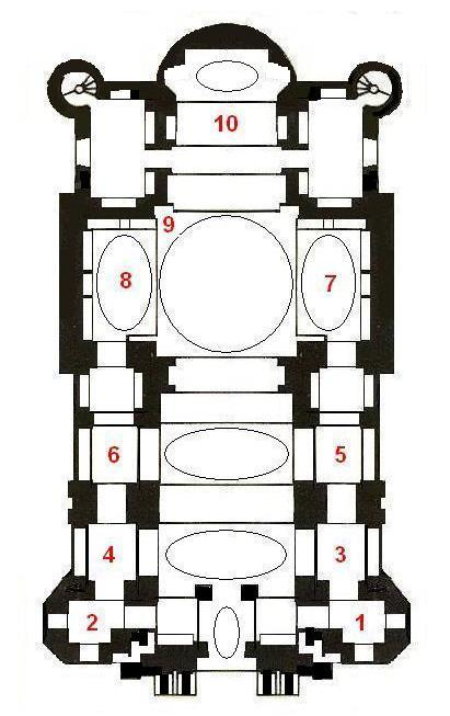 Plan kościoła św. Piotra i Pawła w WilnieMap of Church of Saints Apostles Peter and Paul in Vilnius. Legend: Right round room (?) Left round room (baptistery) Knights (warriors) chapel Women (queen) chapel St.Ursula chapel St.Augustine chapel Sanctuary of the Five Holy Wounds Sanctuary of Mary the Mother of Mercy Sanctuary of Jesus of Antakalnis The presbytery